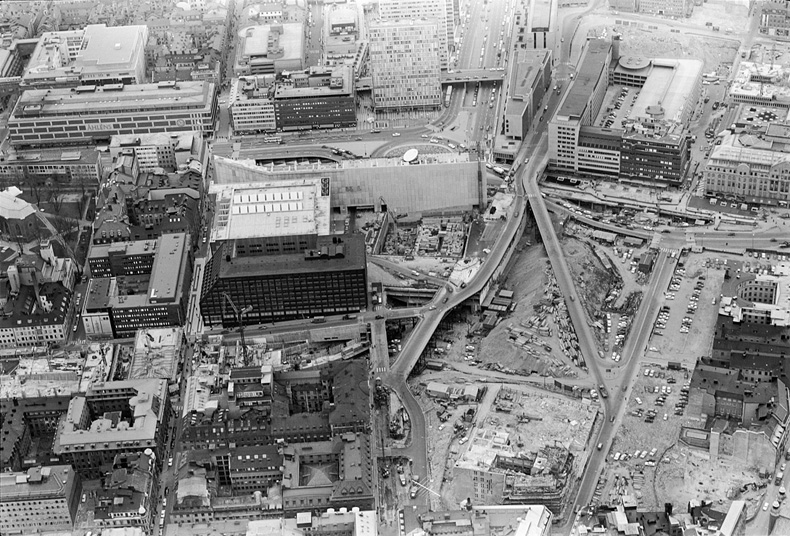 Norrmalm, Drottninggatan, Hamngatan, Brunkebergstorg, Regeringsgatan, Hötorgsskraporna, Sergels torg. City. Rivningar. Motiv: Stockholms innerstad Nyckelord: Flygbilder, Riksintressen Kategori: Stadsmiljö Norrmalm, Drottninggatan, Hamngatan, Brunkebergstorg, Regeringsgatan, Hötorgsskraporna, Sergels torg. City. Rivningar.